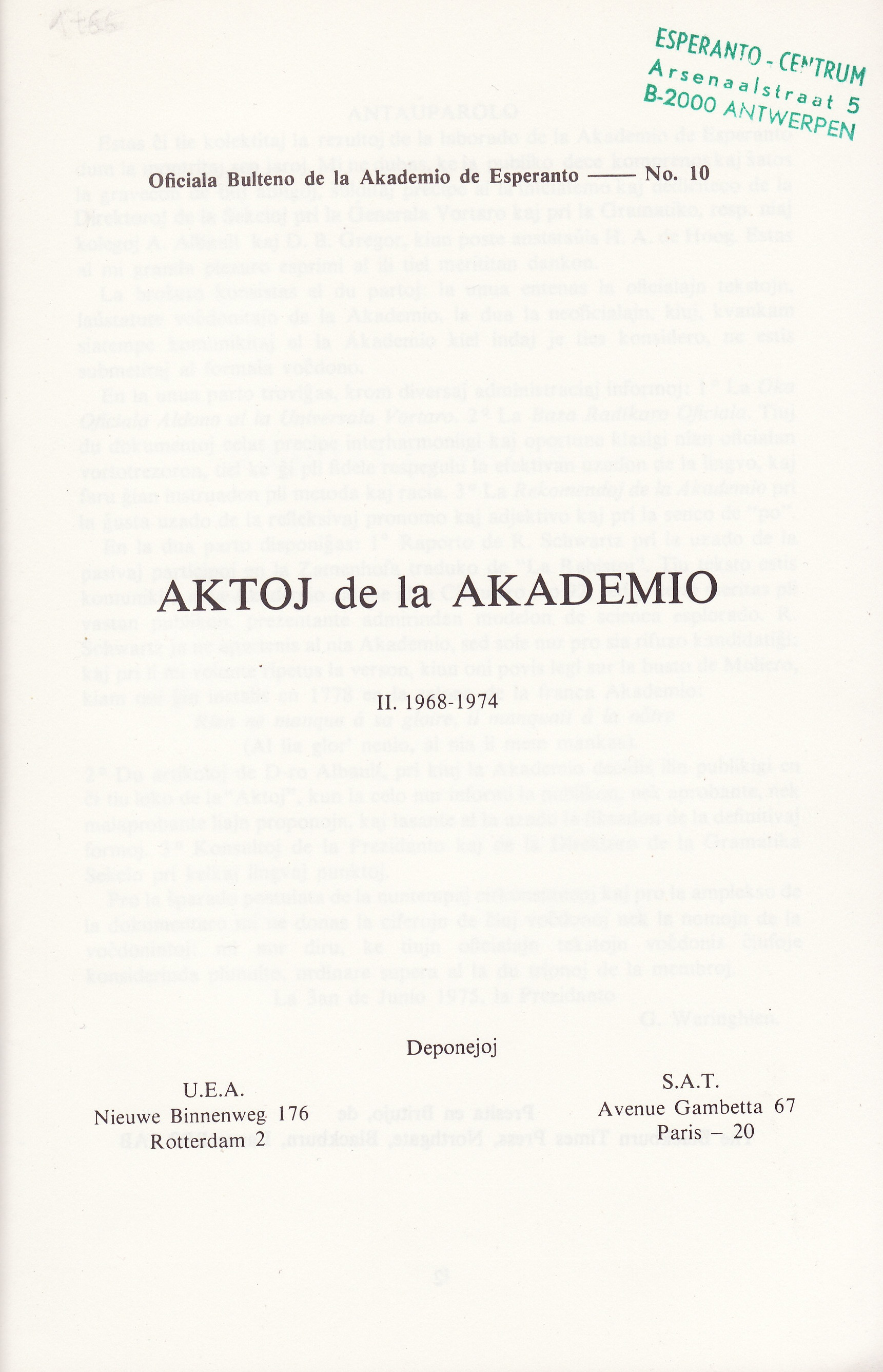 la kovrilpaĝo de "Aktoj de la Akademio 1968-1974"